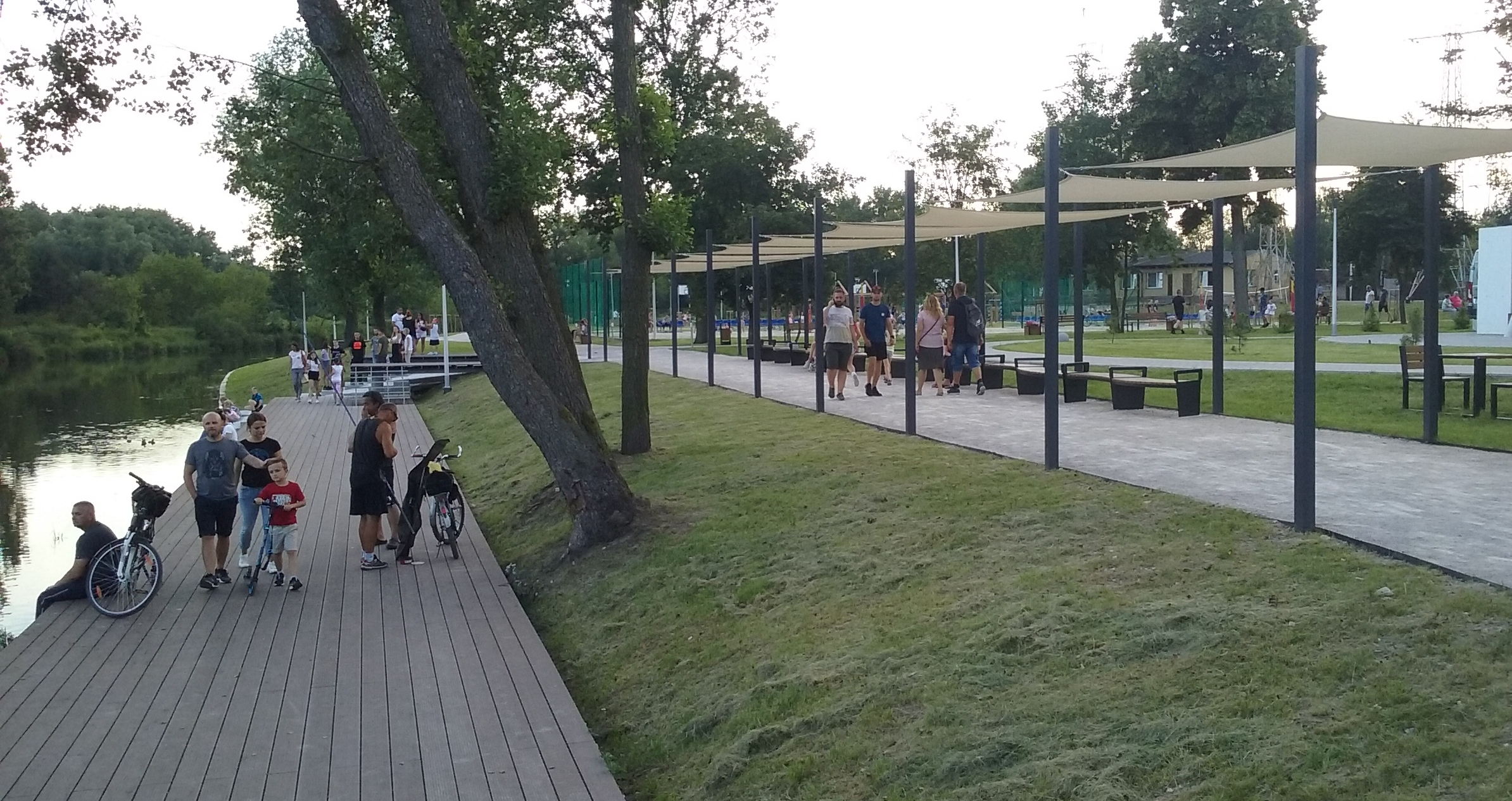 Tomaszów Mazowiecki, przystań nad Pilicą